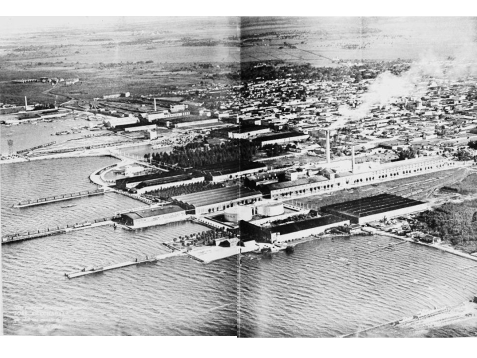 Vista aerea del conjunto industrial Arechabala localizada en la bahía cardenense, Cuba. Fuente: Revista Gordejuela, año 1958